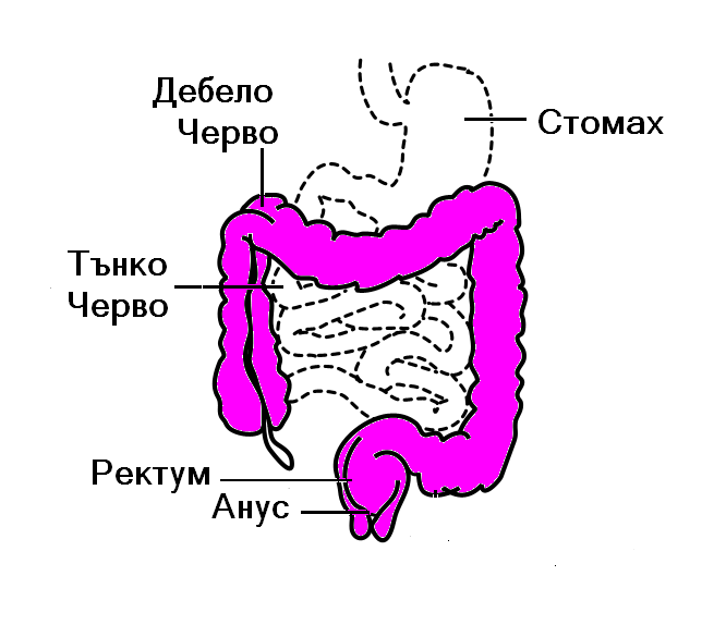 Схема на дебело черво при човека.